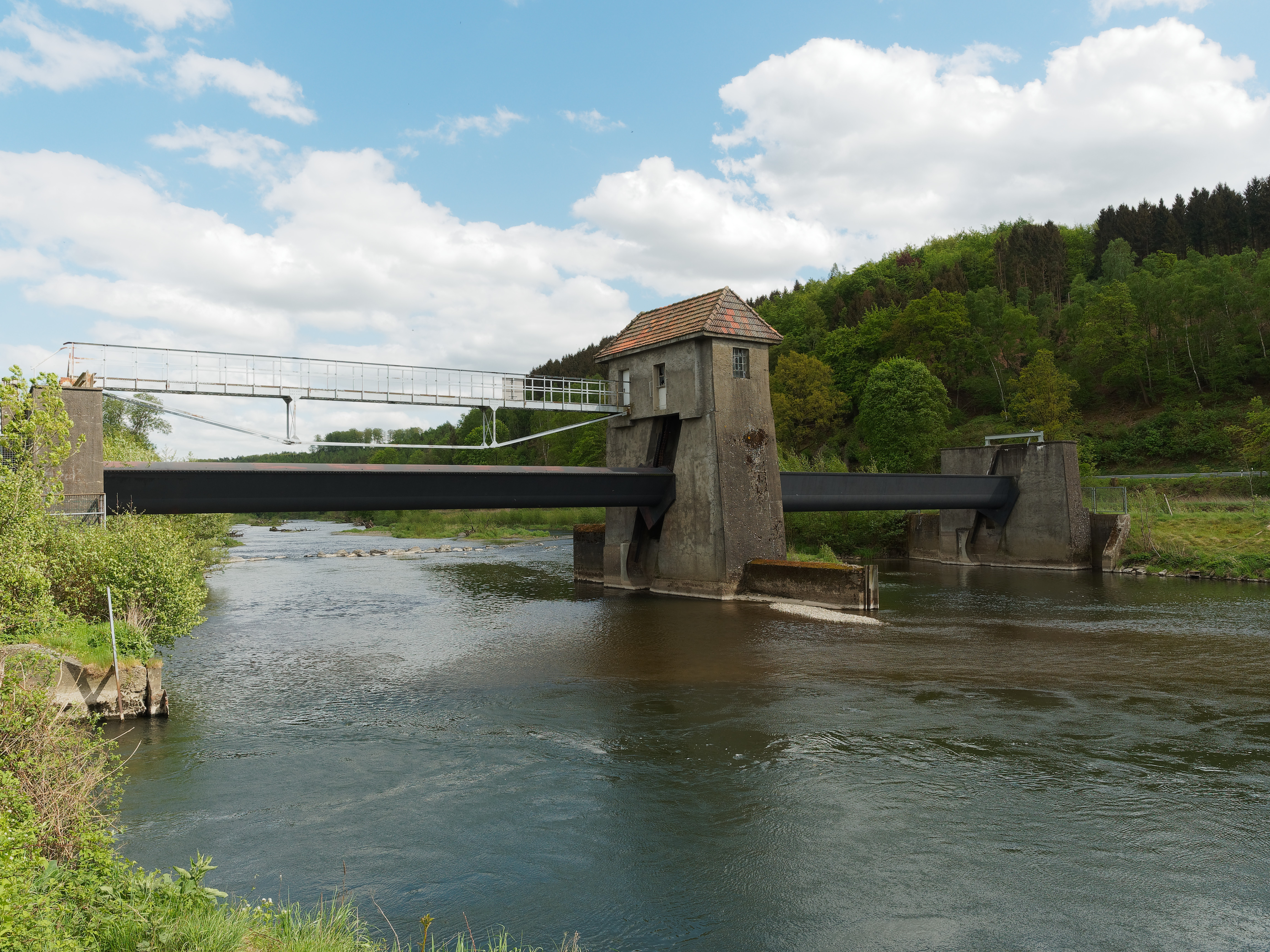 Die Ruhr in Wickede, Blick vom alten Ruhrwehr nach Osten in den renaturierten Bereich des Flusses. Naturschutzgebiet SO-016.